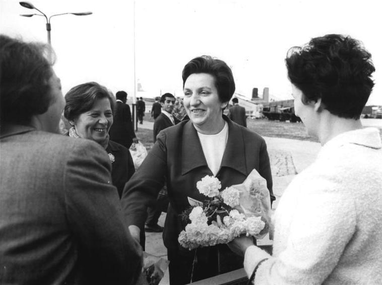 Zentralbild Spremberg Th-Gr 2.7.1967 Berlin: Zur Außerordentlichen Konferenz der Organisation für Afro-Asiatische Solidarität in Kairo ... flog am Morgen des 2.7.1967 die Vorsitzende des DFD Ilse Thiele (Mitte) als Delegierte der IDFF vom Zentralflughafen Berlin-Schönefeld ab. Sie wurde herzlich von den Bundessekretären Olga Meyer (rechts) und Gisela Straub (links) verabschiedet. Die Konferenz in Kairo wird sich mit der Situation im Nahen Osten nach der imperialistischen Aggression gegen die arabischen Staaten beschäftigen. Information added by Wikimedia users. links neben Ilse Thiele: Ann Notowicz, Antifaschistische Widerstandskämpferin aus den Niederlanden